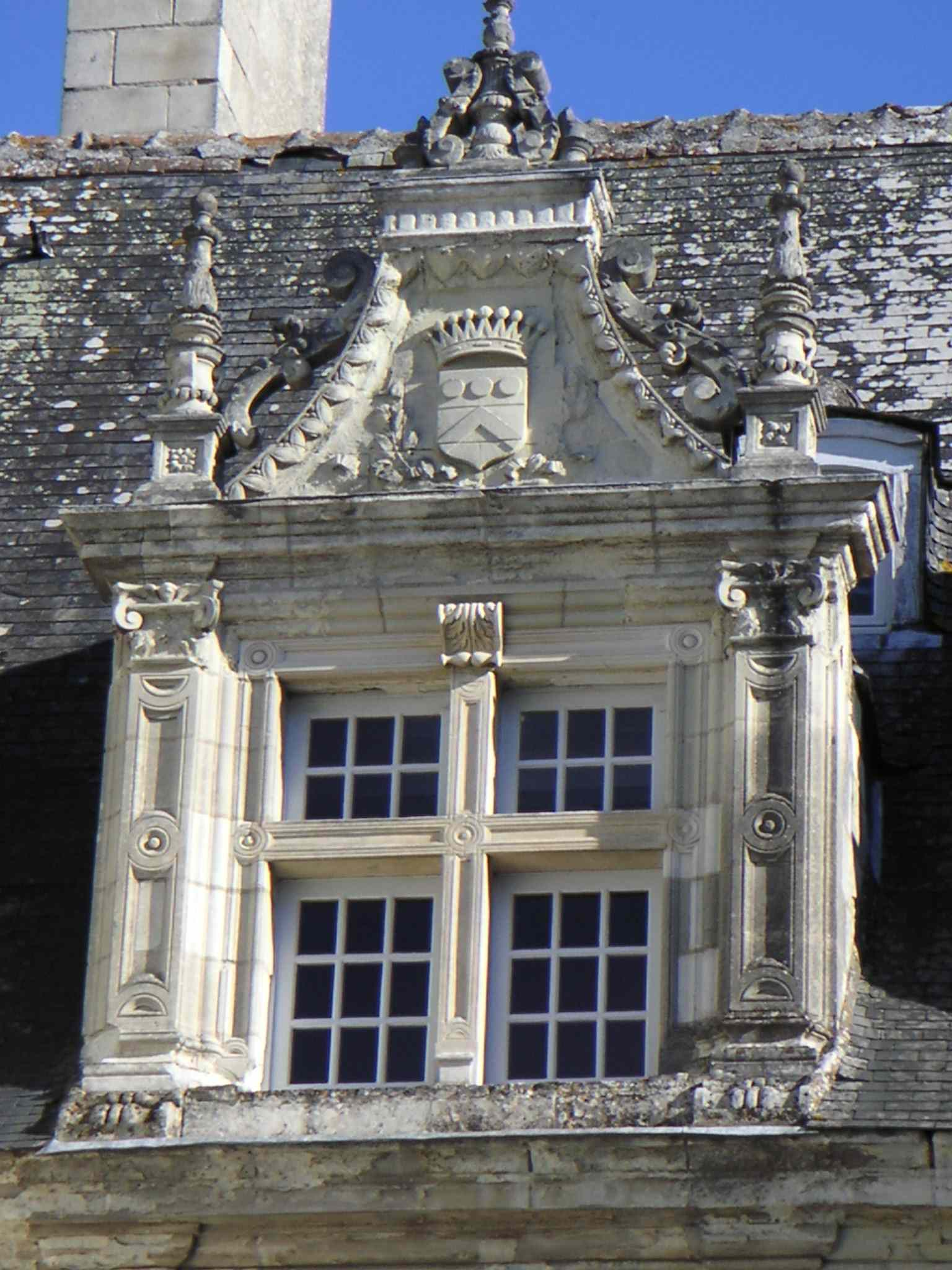 Lucarne style renaissance château de Villandry (France)